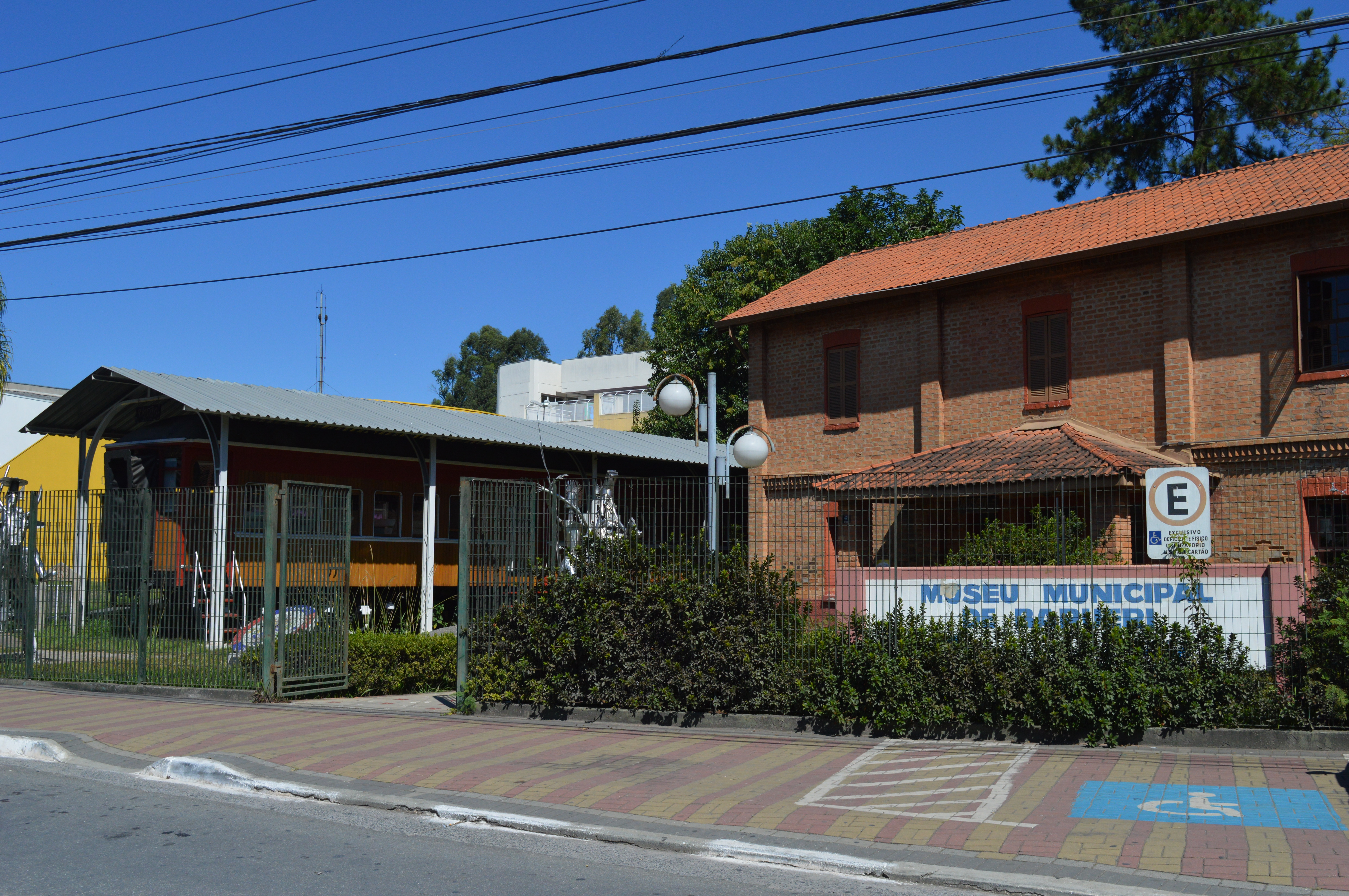 Foto da Entrada principal do Museu Municipal de Barueri, o casarão e ao lado o Vagão de Trem de Passageiros restaurado.